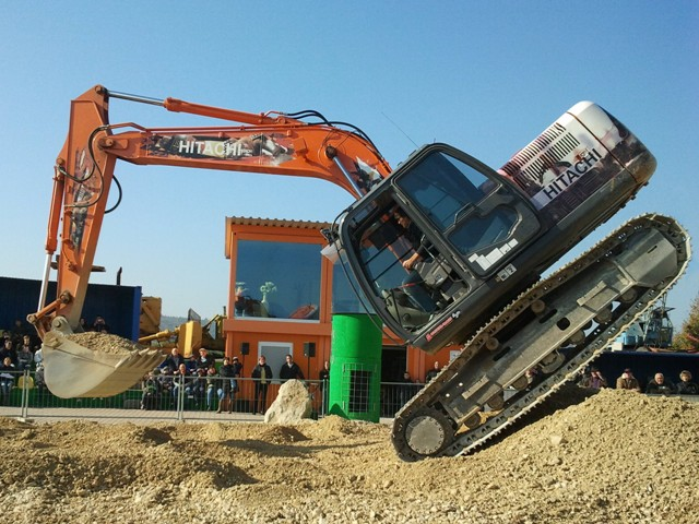 Dieses Bild wurde bei einer Baggershow im Jahr 2012 im Monsterpark Rattelsdorf aufgenommen.